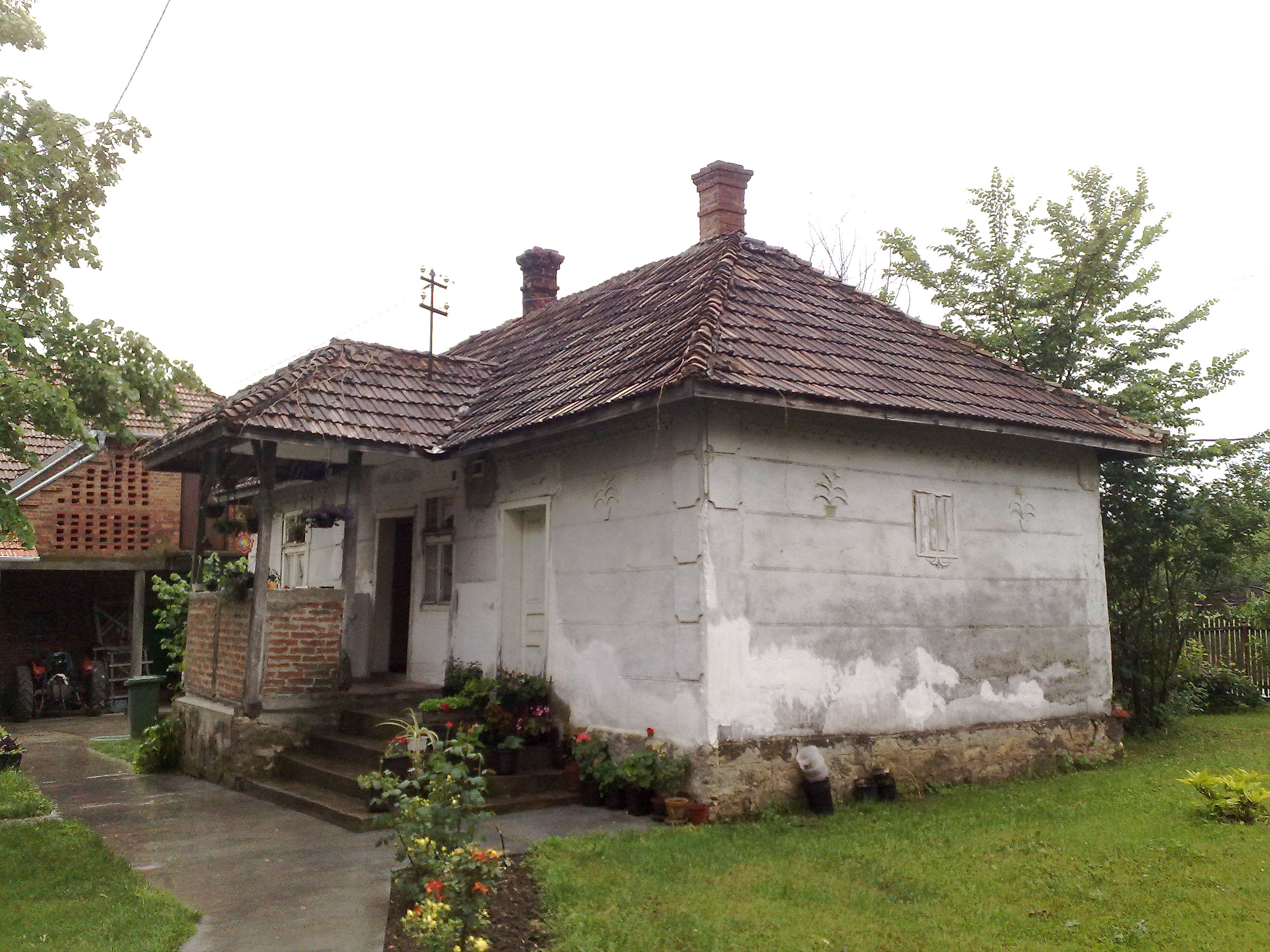 Кућа породице Антонијевић, тридесете године двадесетог века, село Горња Трнава код Тополе.